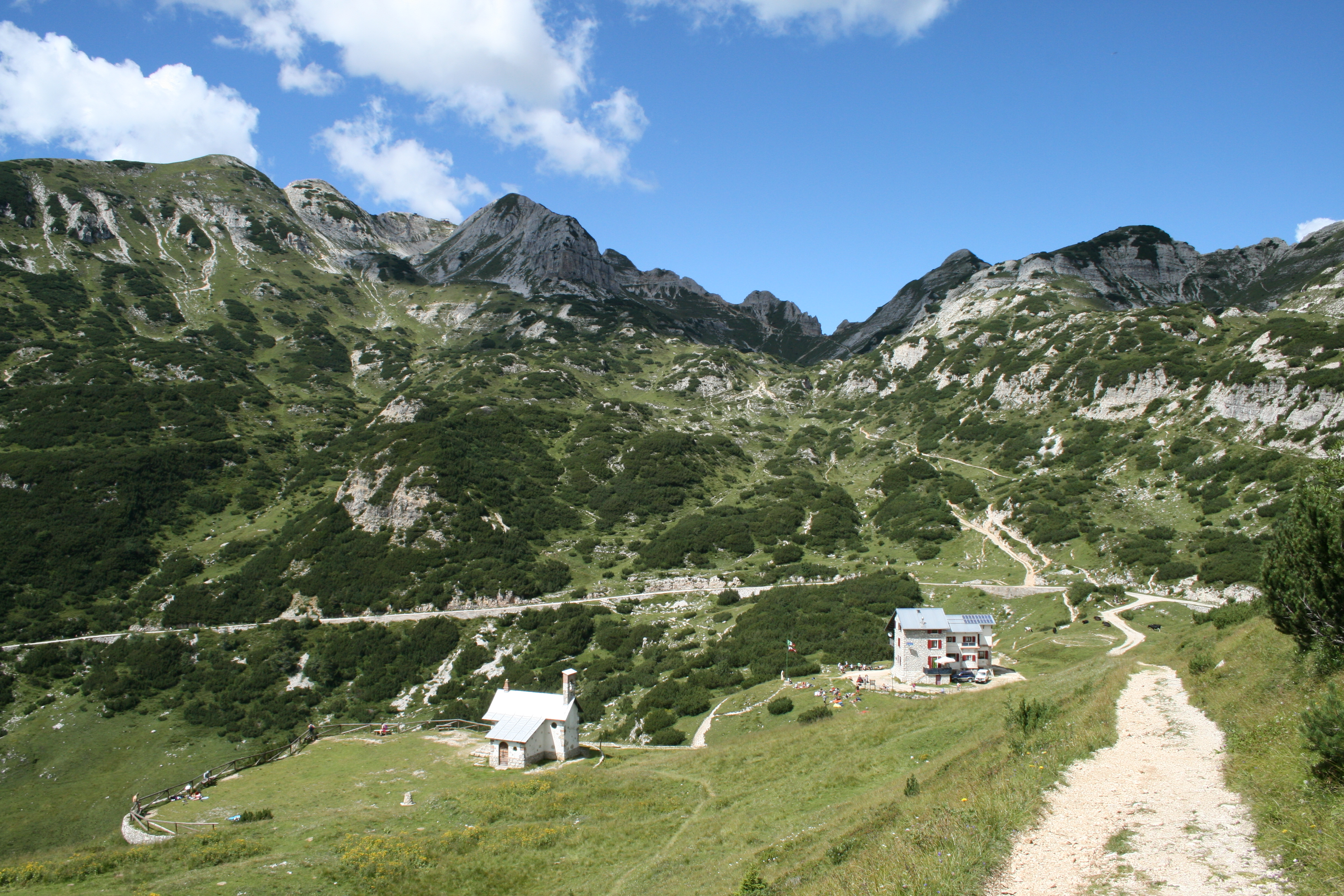 Il rifugio Pompeo Scalorbi nella Riserva naturale guidata di Campobrun e la chiesetta ai morti alpini.(Q3936810)